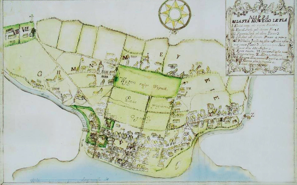 Беларуская (тарашкевіца): Лепель (Lepiel). Мапа места